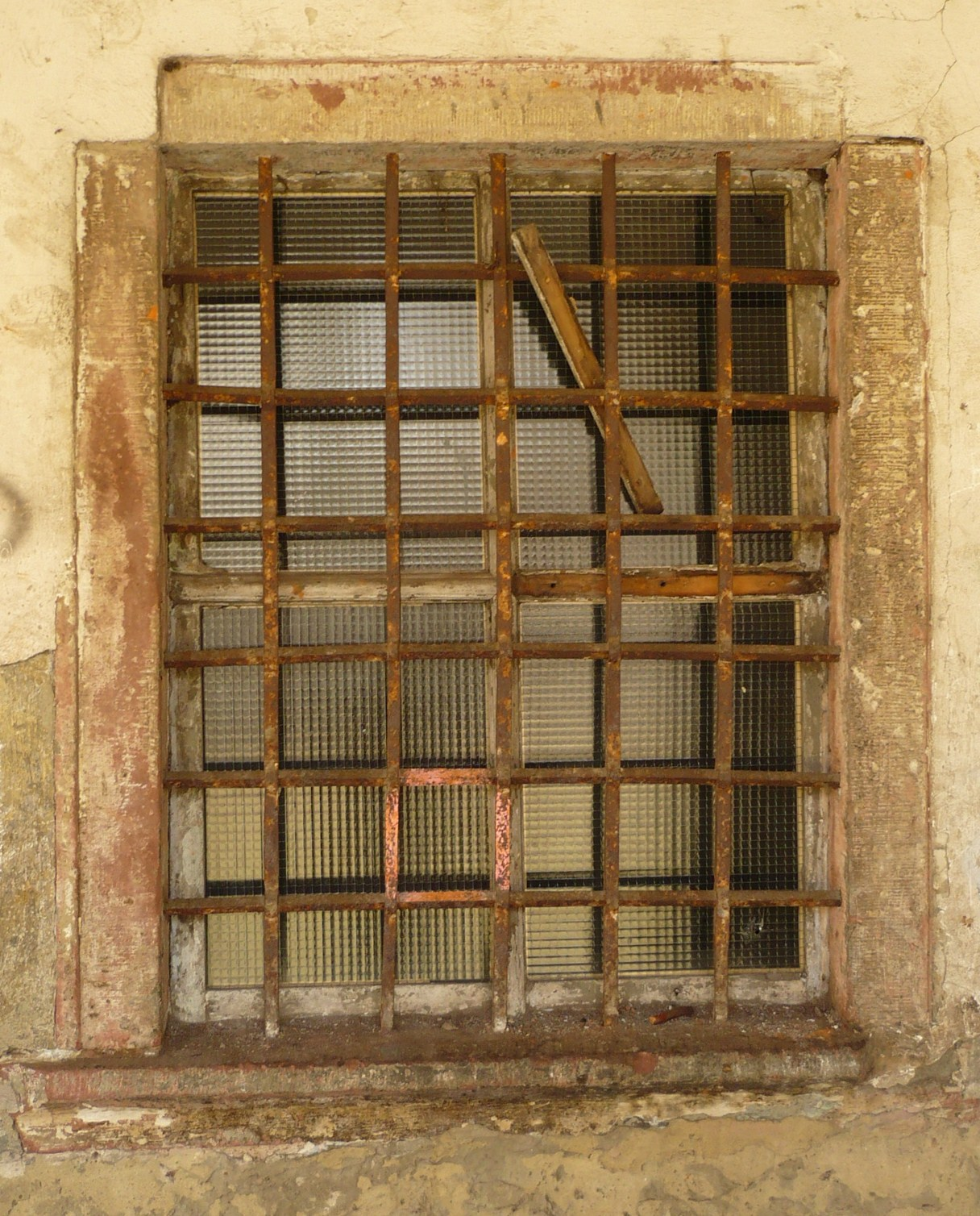 Nowa Ruda ul. Nadrzeczna 6, okno